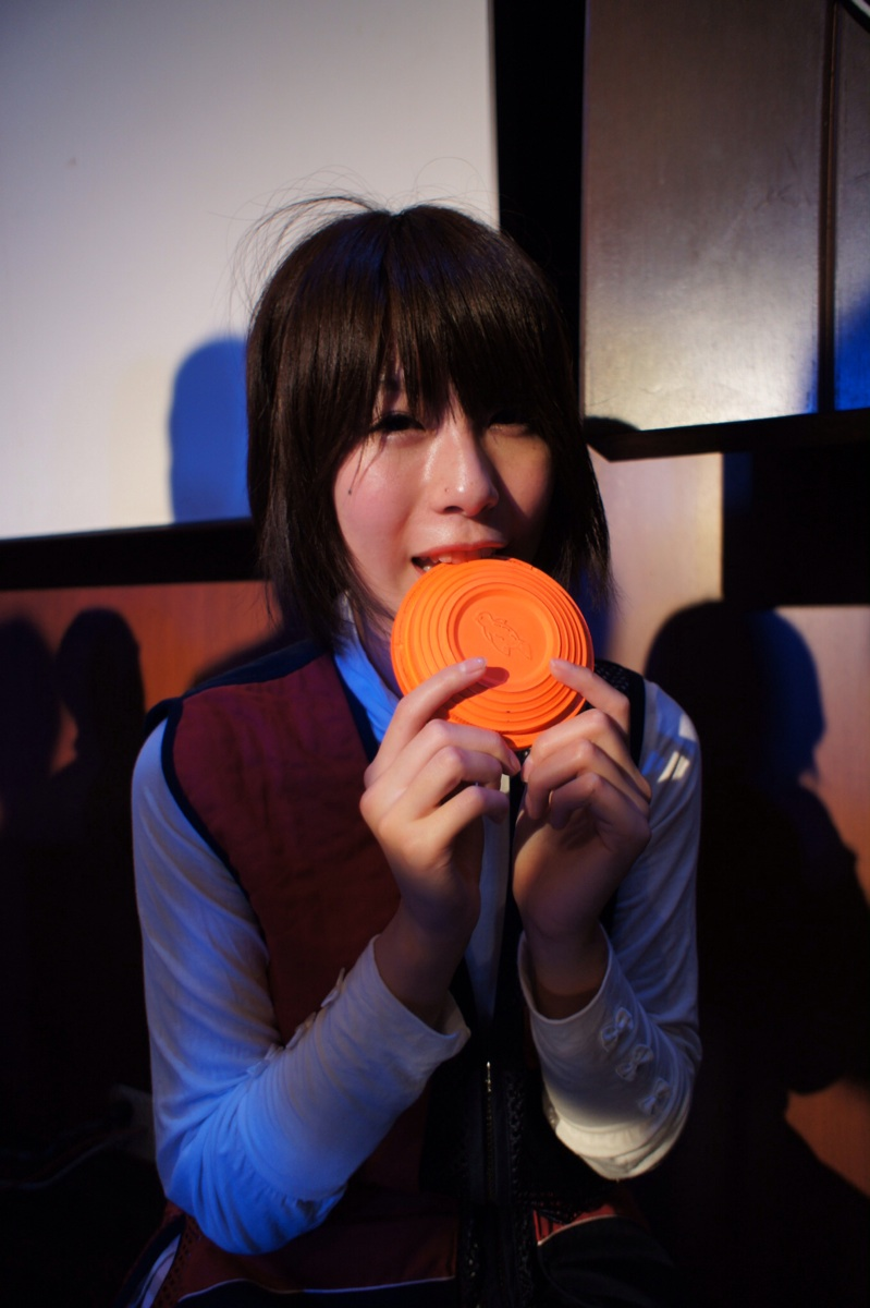 「ヲ乙女図鑑」発売記念イベント『ヲ乙女ナイト(をとめないと）!!～ヲタクで可憐なヲ乙女アイドル総決起集会!!』 戦車に乗らせてあげたい、Mamorの表紙飾って欲しい